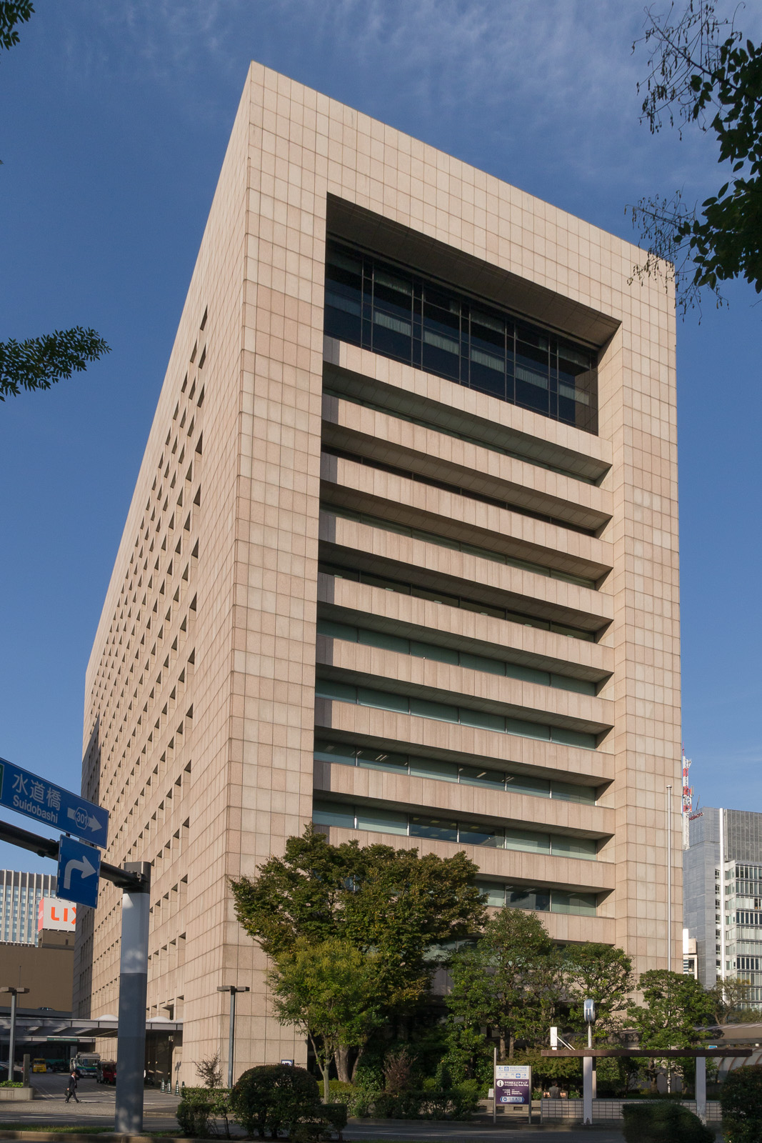 竹橋合同ビル、東京都千代田区大手町1-4-1。国際協力銀行本店、国家公務員共済組合連合会KKRホテル東京などが入居。